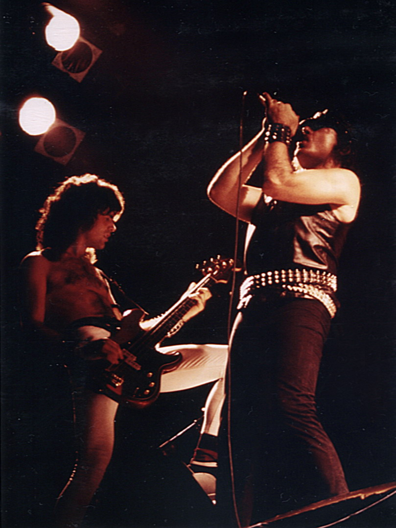 Santi Rubio y Juan Gallardo en Mazarron 1985